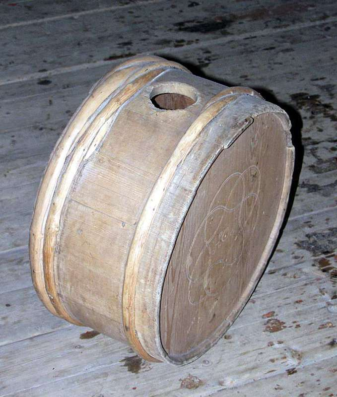 Lagget kløvflaske av furu, dekorert med geometriske mønster på sidene. Datert 1765 og brukt i Alvdal i Hedmark. Høyde 53 cm. Foto Haakon Harriss / Norsk Folkemuseum, NFL.15951.